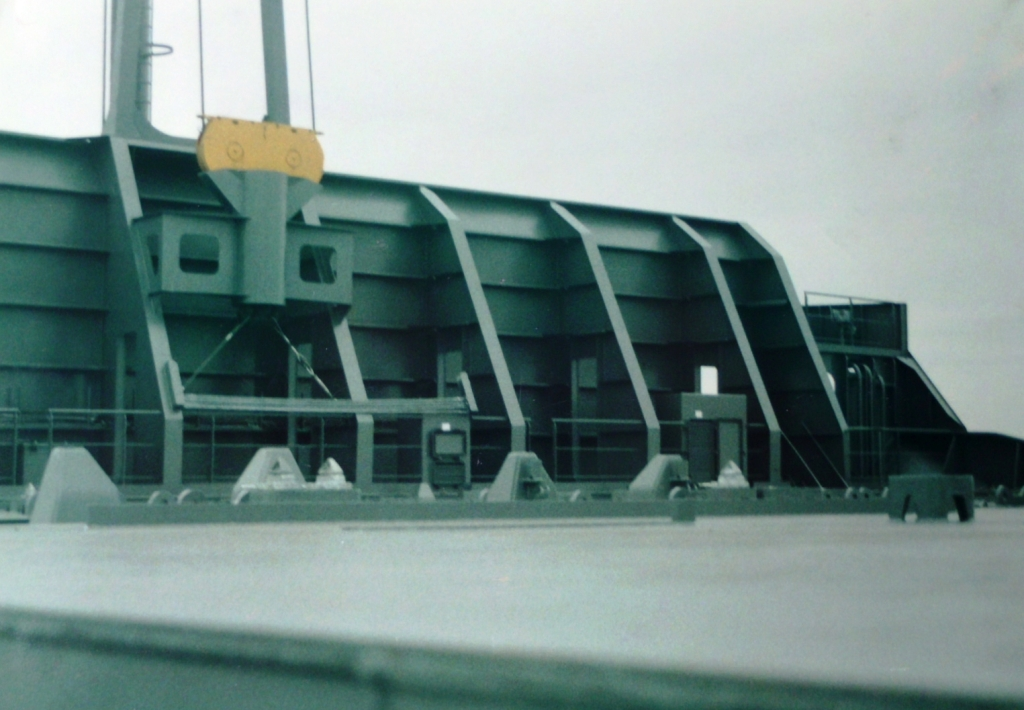 Norasia Samantha, Wellenschutzwand auf der Back